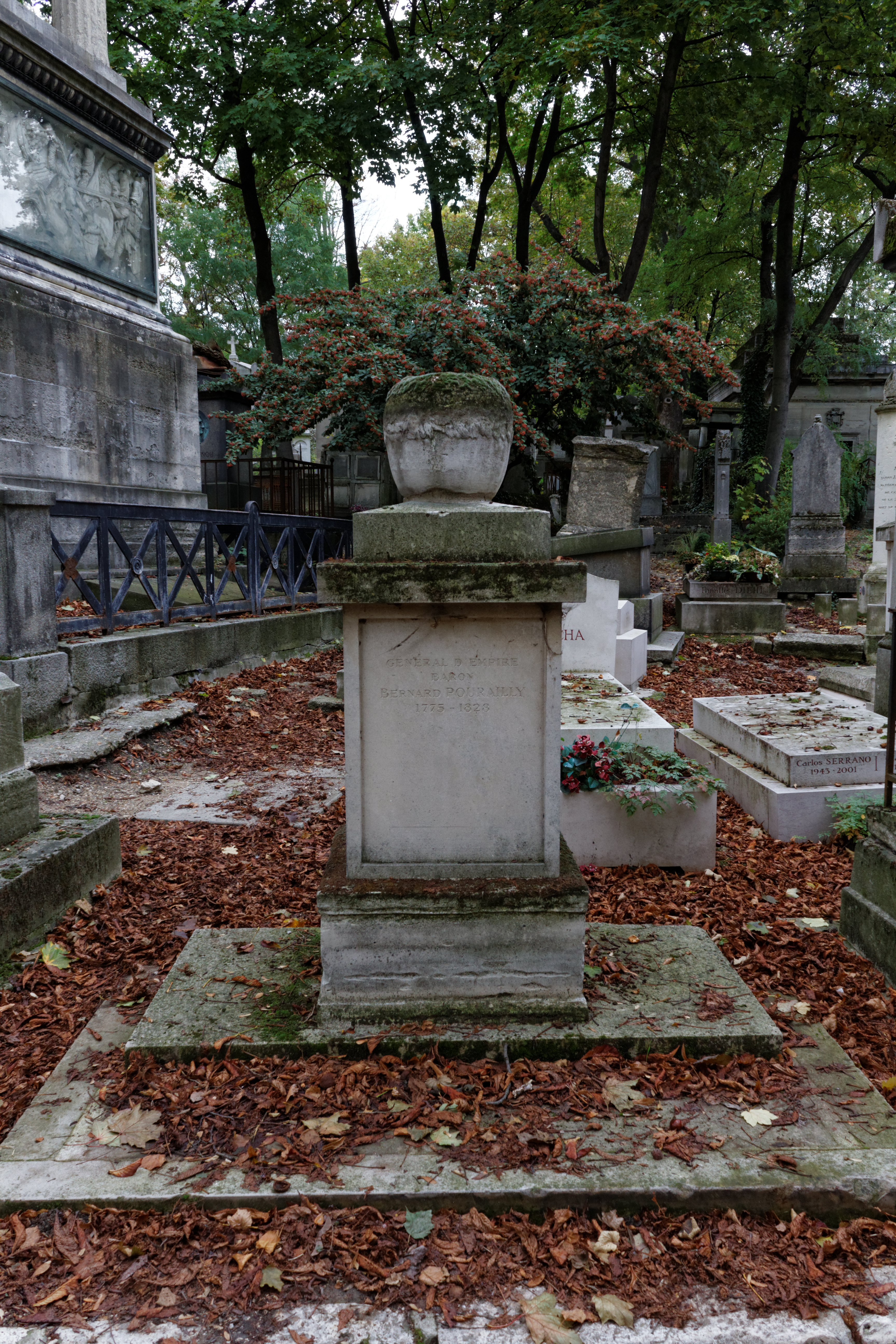 Sépulture de Bernard Pourailly (1775-1828), général français de la Révolution et de l'Empire.